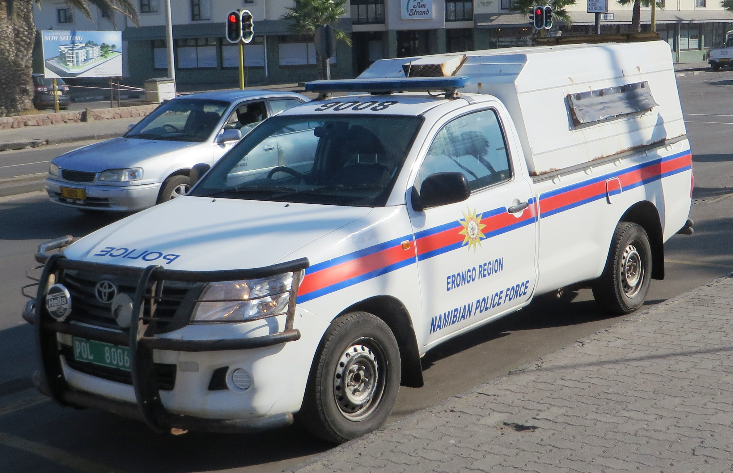 Politieauto in Namibië